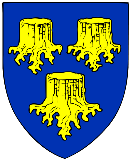 Shield of Allerød Municipality (2007)